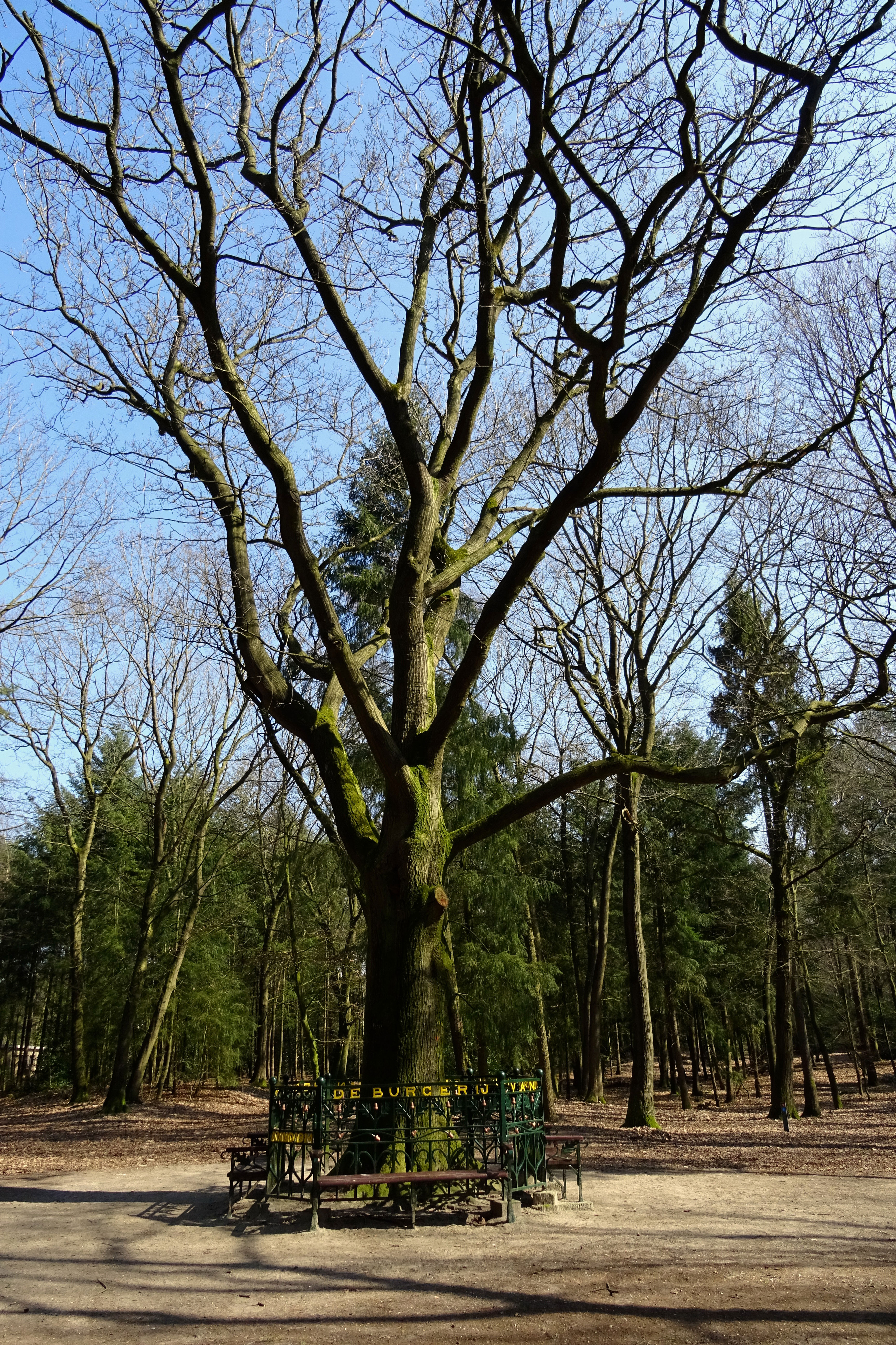 Gedenkboom en bank in het Luntersche Buurtbosch, smeedijzeren hek is ontworpen door ir. J.W. Dinger en gemaakt door de smid Koops